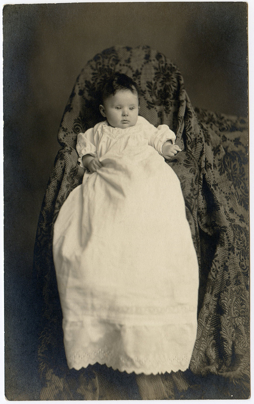 Анонимный фотограф, Великобритания, II половина XIX века. Спрятанная мать